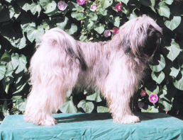 Hembra joven de Terrier tibetano (Astak-Lha-Mo de Khyi-Lha)